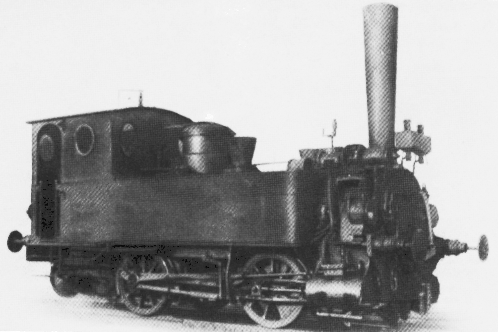 Dampflokomotive Pfälzische T 2 I beziehungsweise Dampflokomotive Badische I b.